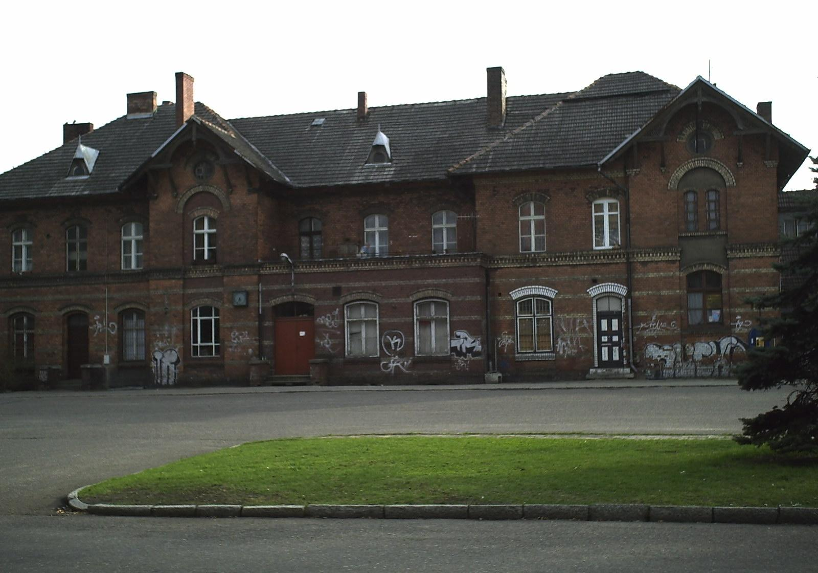 Railroad station, Skwierzyna (lubuskie voivodship), Poland.